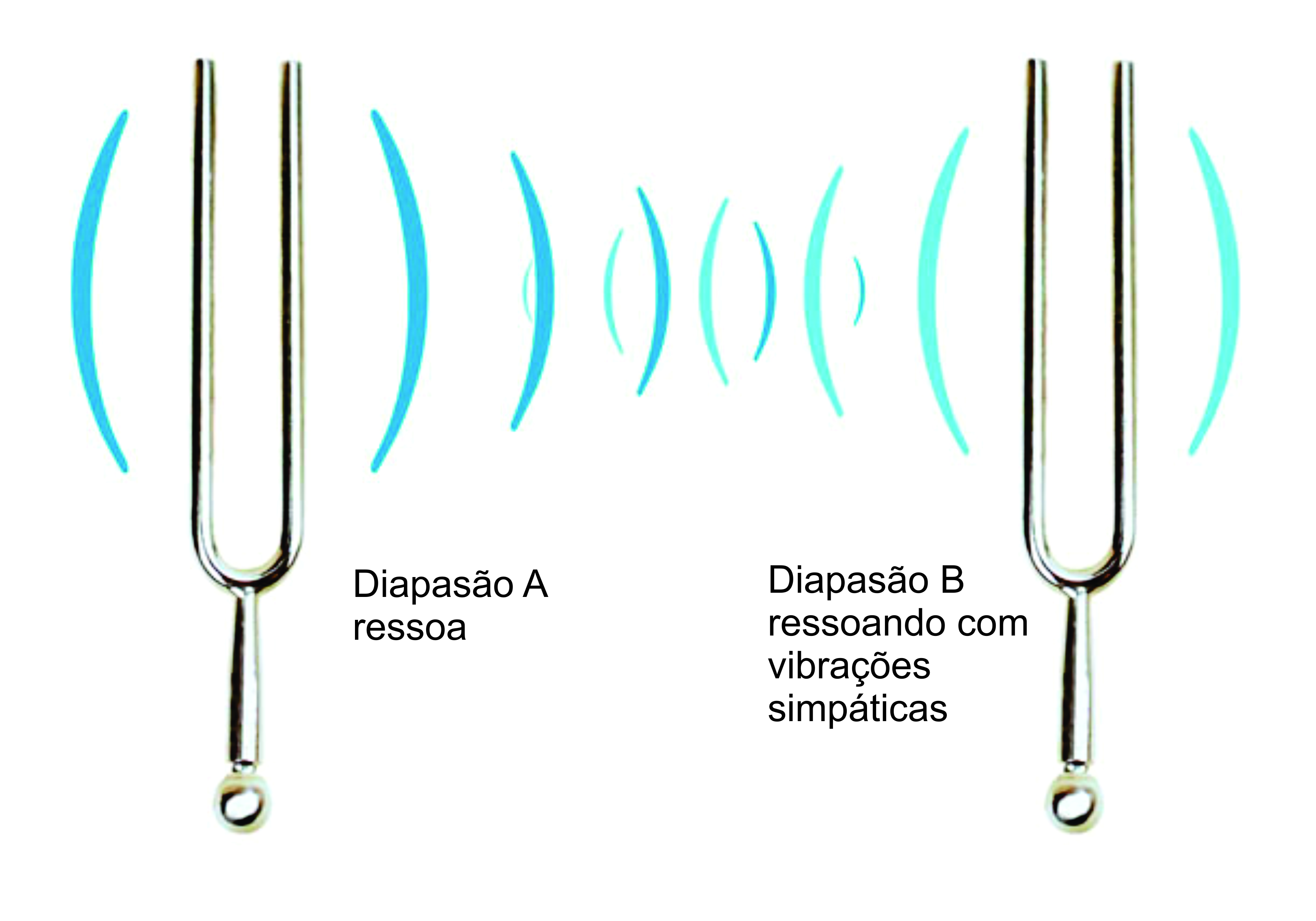 Diapasões vibrando em ressonância